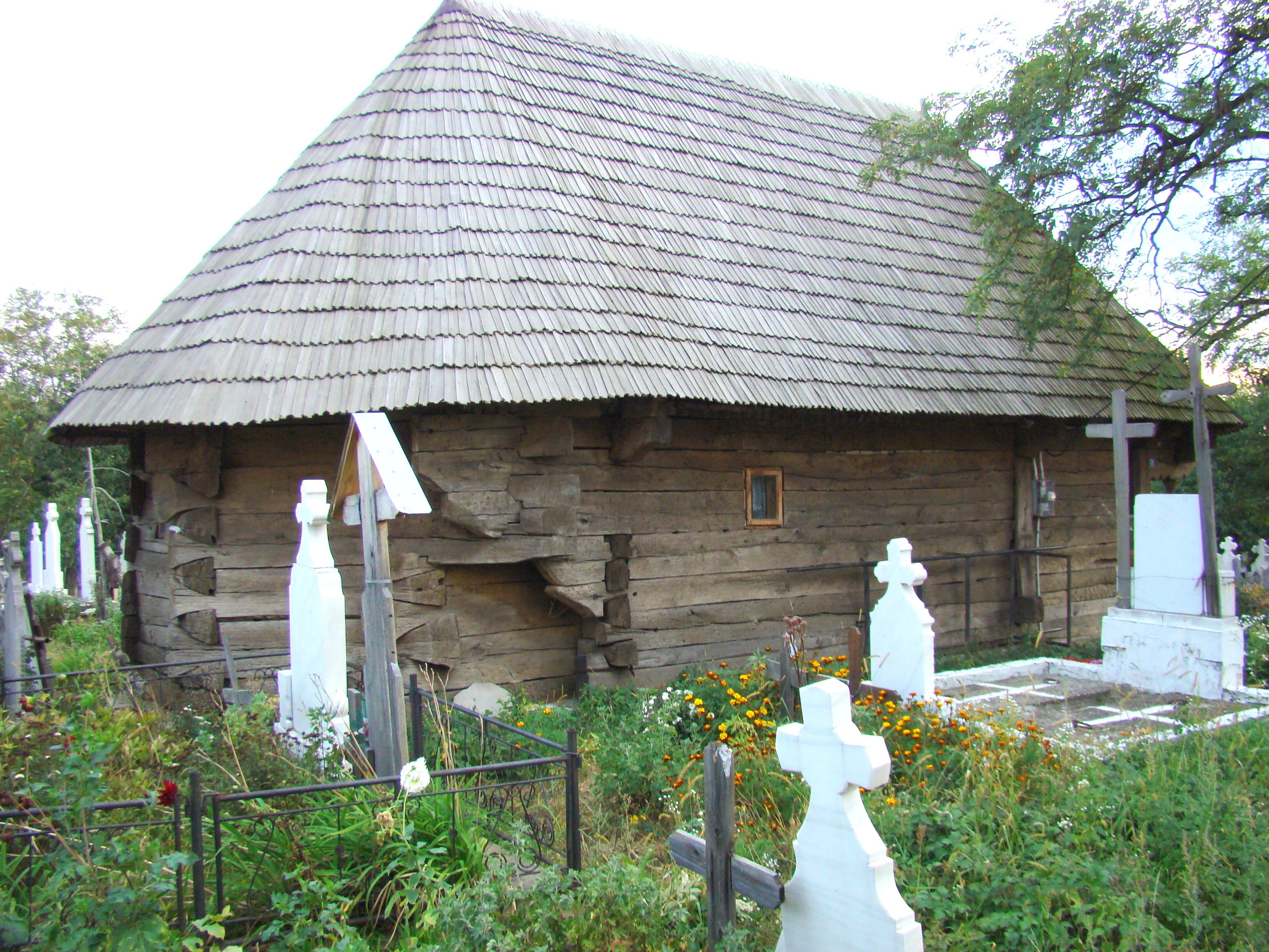 Biserica de lemn „Intrarea în Biserică” din Stâncești-Larga, Gorj